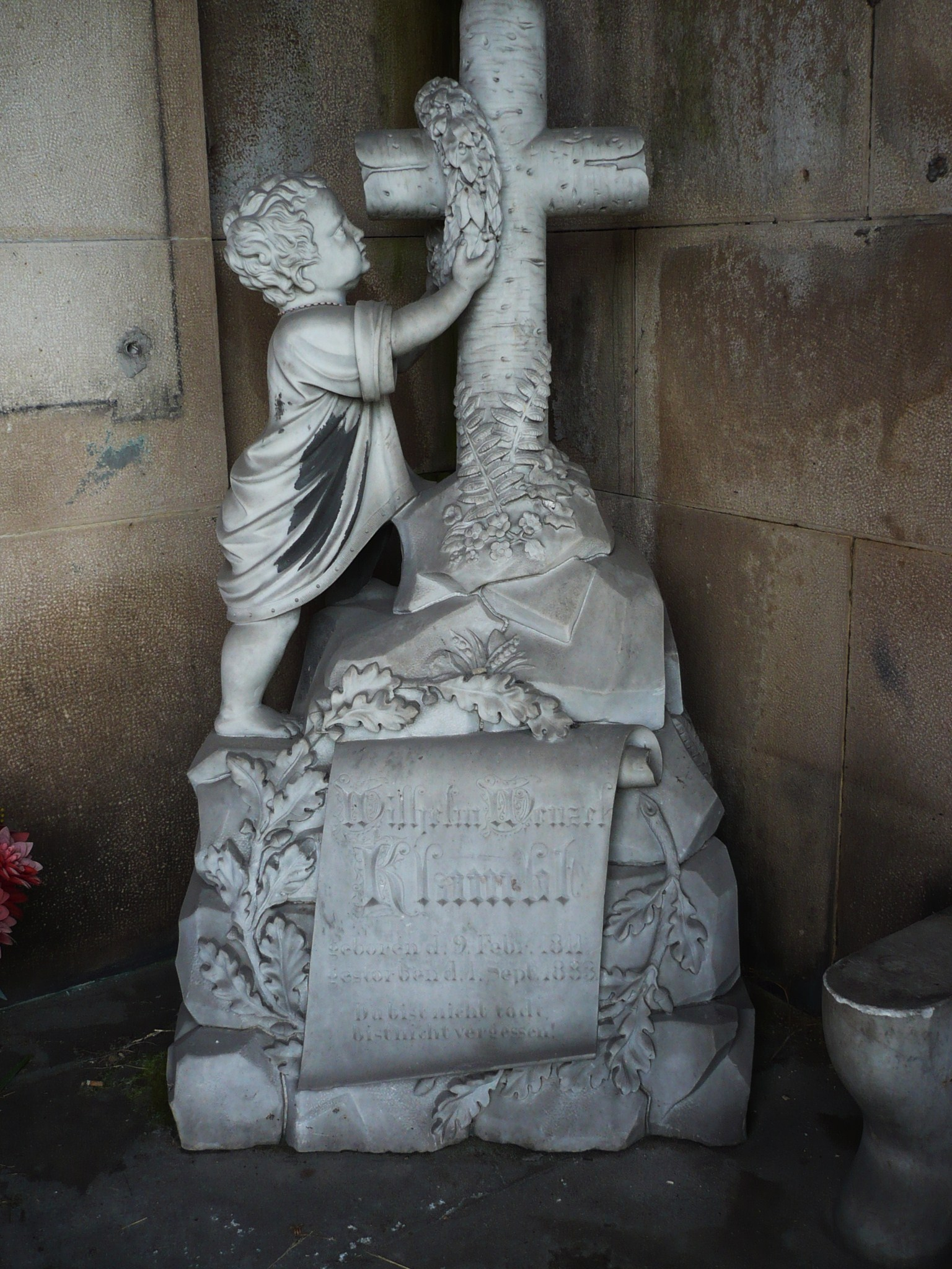 Nowa Ruda, ul. Cmentarna - cmentarz komunalny (nagrobek Wilhelma W. Klambta w grobowcu rodziny Rose)